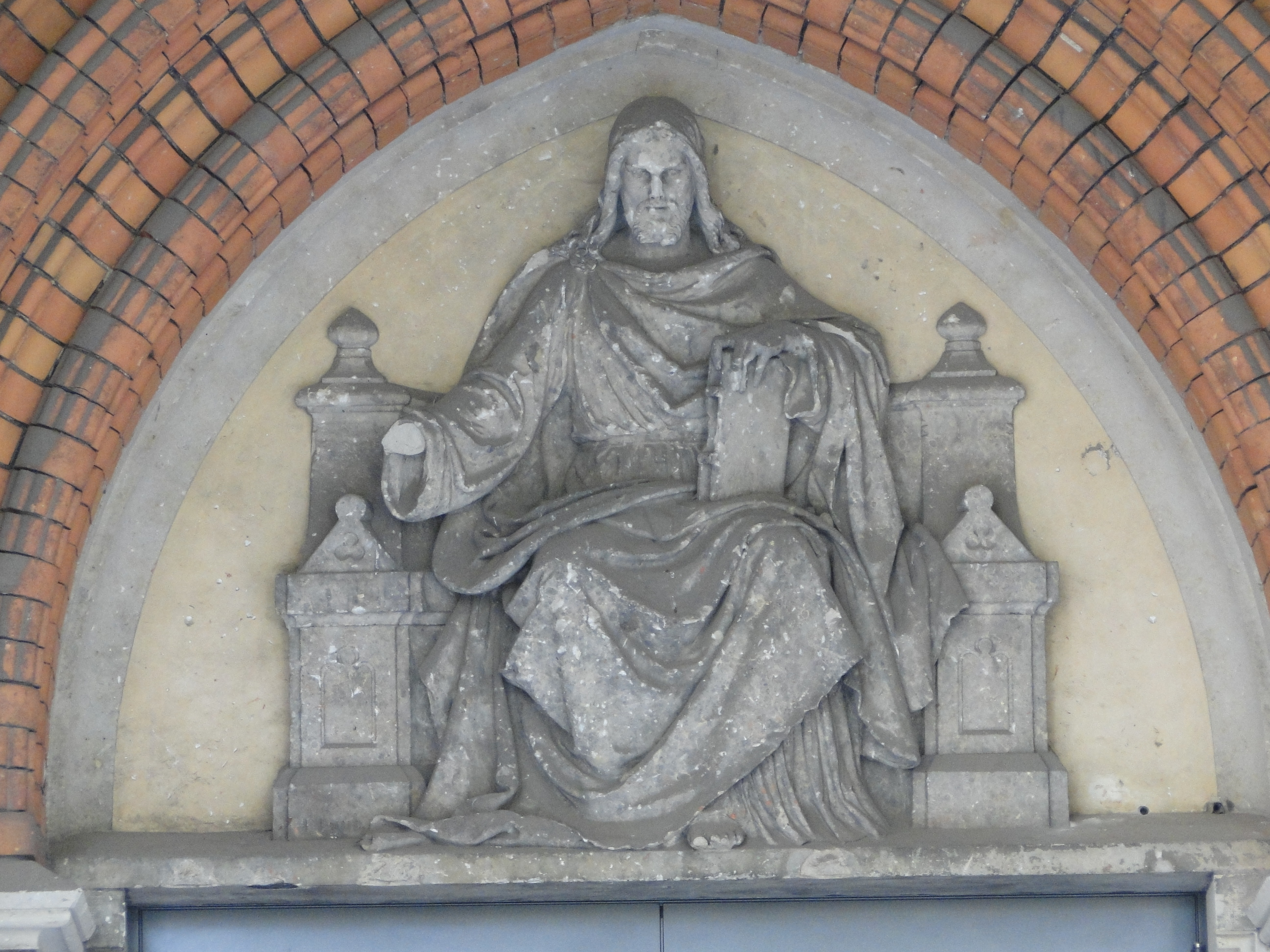 Kulturdenkmal Königsbrücker Platz Dresden Ruine St. Pauli-Kirche Detail